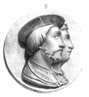 Album du Dauphiné - tome IV, litographie des Dauphins : 9. Jean II et Béatrix de Hongrie